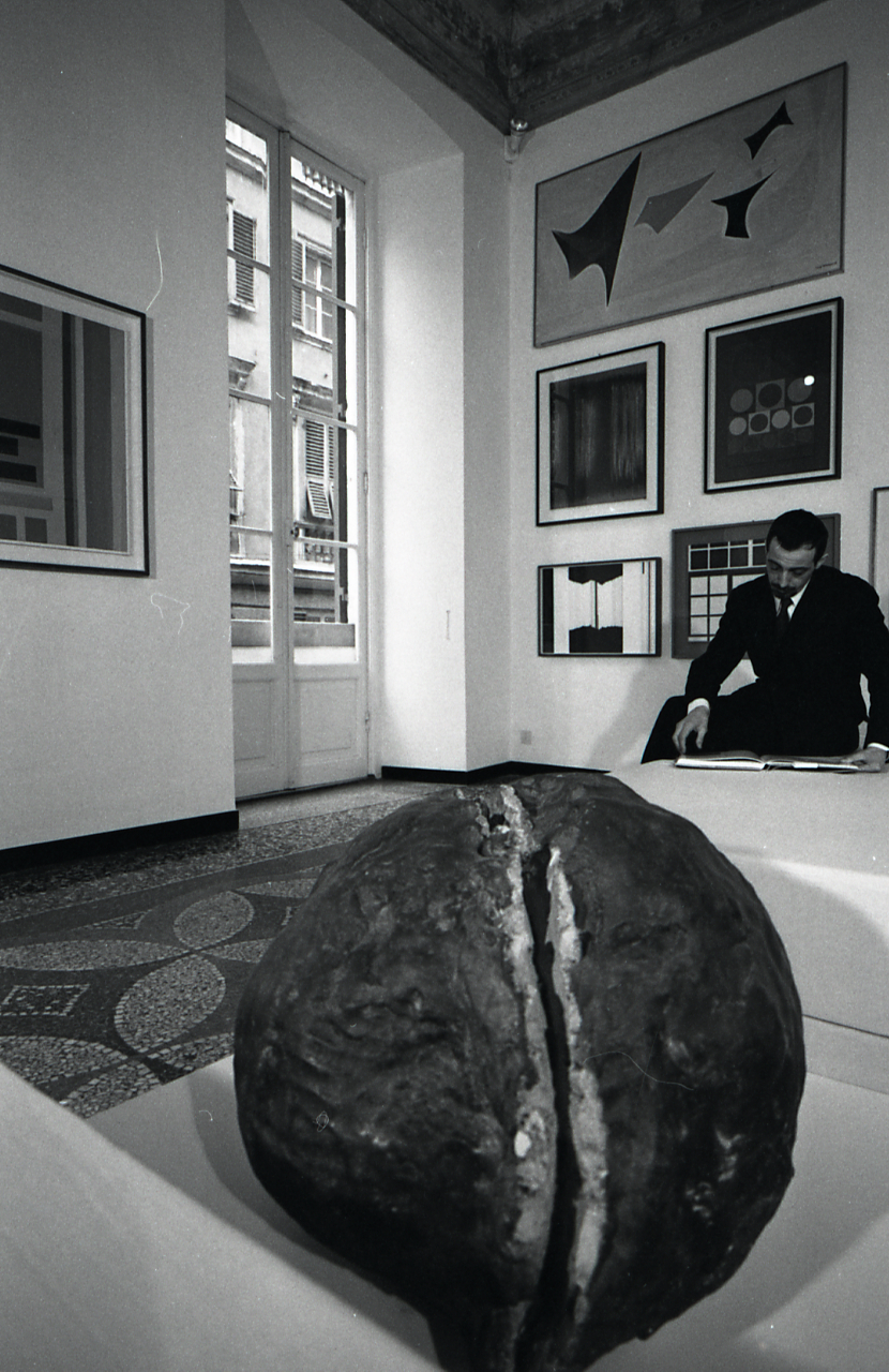 Servizio fotografico : Genova, 1967 / Paolo Monti. - Strisce: 3, Fotogrammi complessivi: 16 : Negativo b/n, gelatina bromuro d'argento/ pellicola ; 35 mm. - ((I fotogrammi hanno una doppia numerazione. . - Sul portanegativi: Leica M 21 mm Adox 21. - Occasione: Progetto Fronzoni: appartamento Edoardo Manzoni, collezionista, via Caffaro 27/3. - Fonte: Agenda di Paolo Monti: Monti/ 3 aprile 1966 - 9 marzo 1971/ 12421-16823 (1966-1971), presso Archivio Paolo Monti